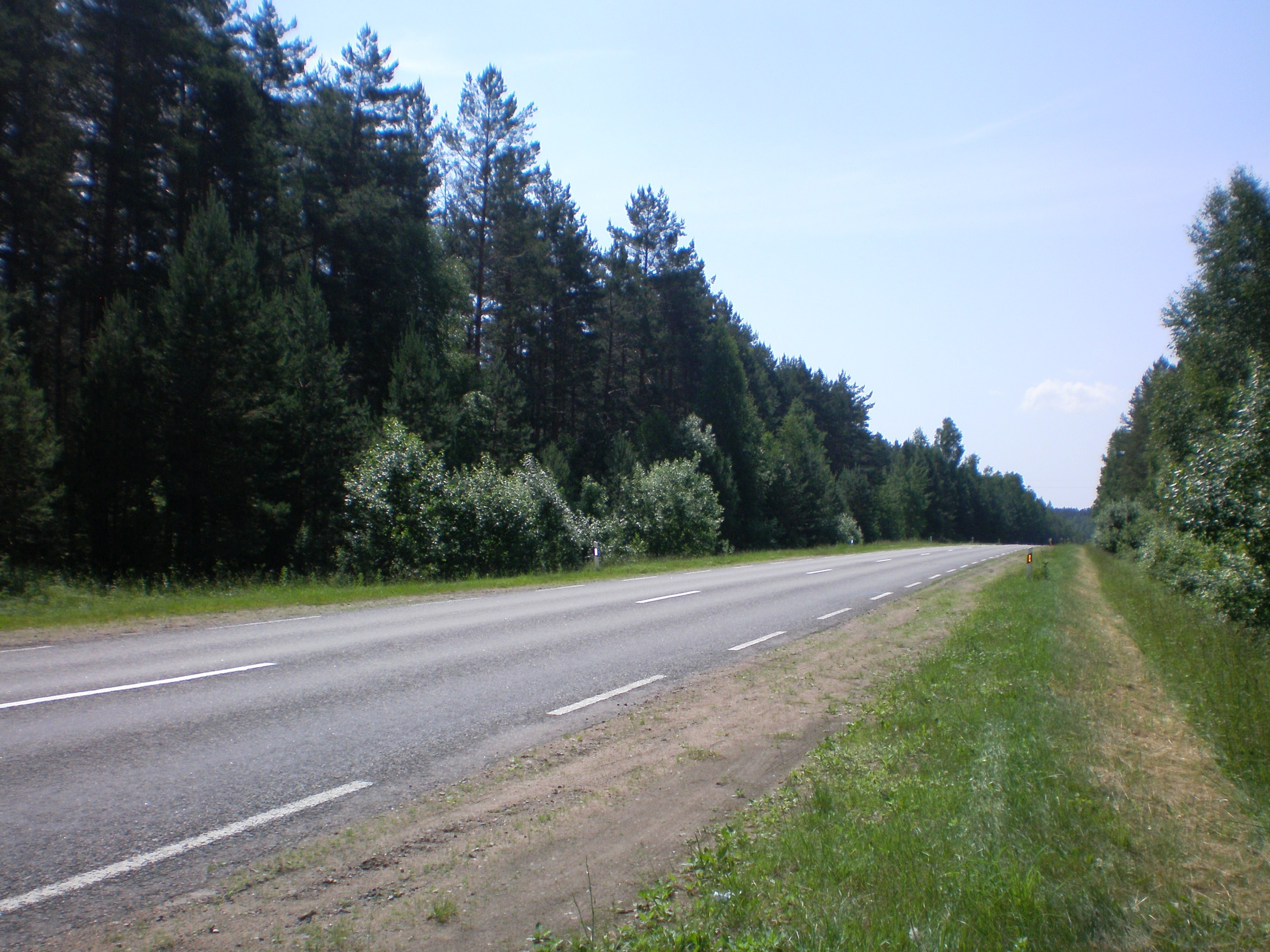 Kelias A4, Varėnos raj., netoli Merkinės